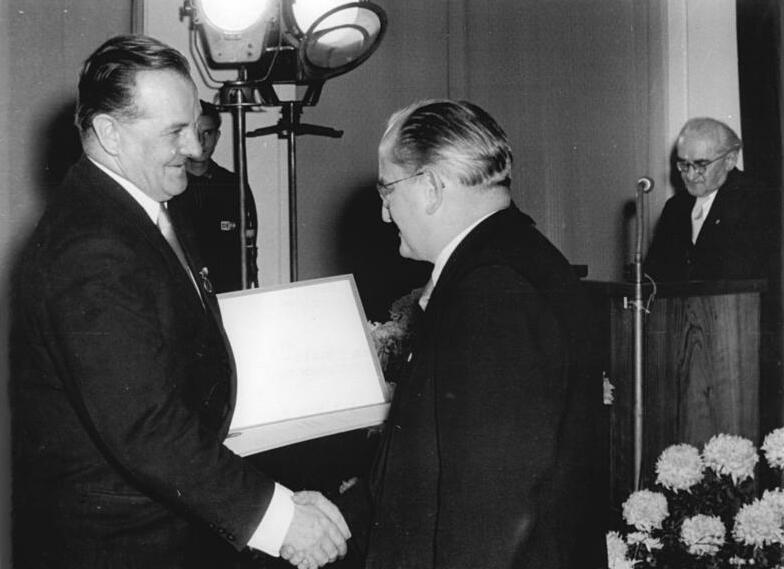 Zentralbild Heilig 6.10.1954 Verleihung des Vaterländischen Verdienstordens Am 5.10.1954, am Vortag des 5. Jahrestages der Gründung der Deutschen Demokratischen Republik, waren im Amtssitz des Präsidenten der Republik in Berlin-Niederschönhausen, verdienten Bürgern der Vaterländische Verdienstorden verliehen. UBz: Im Namen des Präsidenten verlieh Staatssekretär Winzer als Zeichen der Anerkennung besonderer künstlerischer Leistungen Prof. Richard Paulick den Vaterländischen Verdienstorden in Silber.